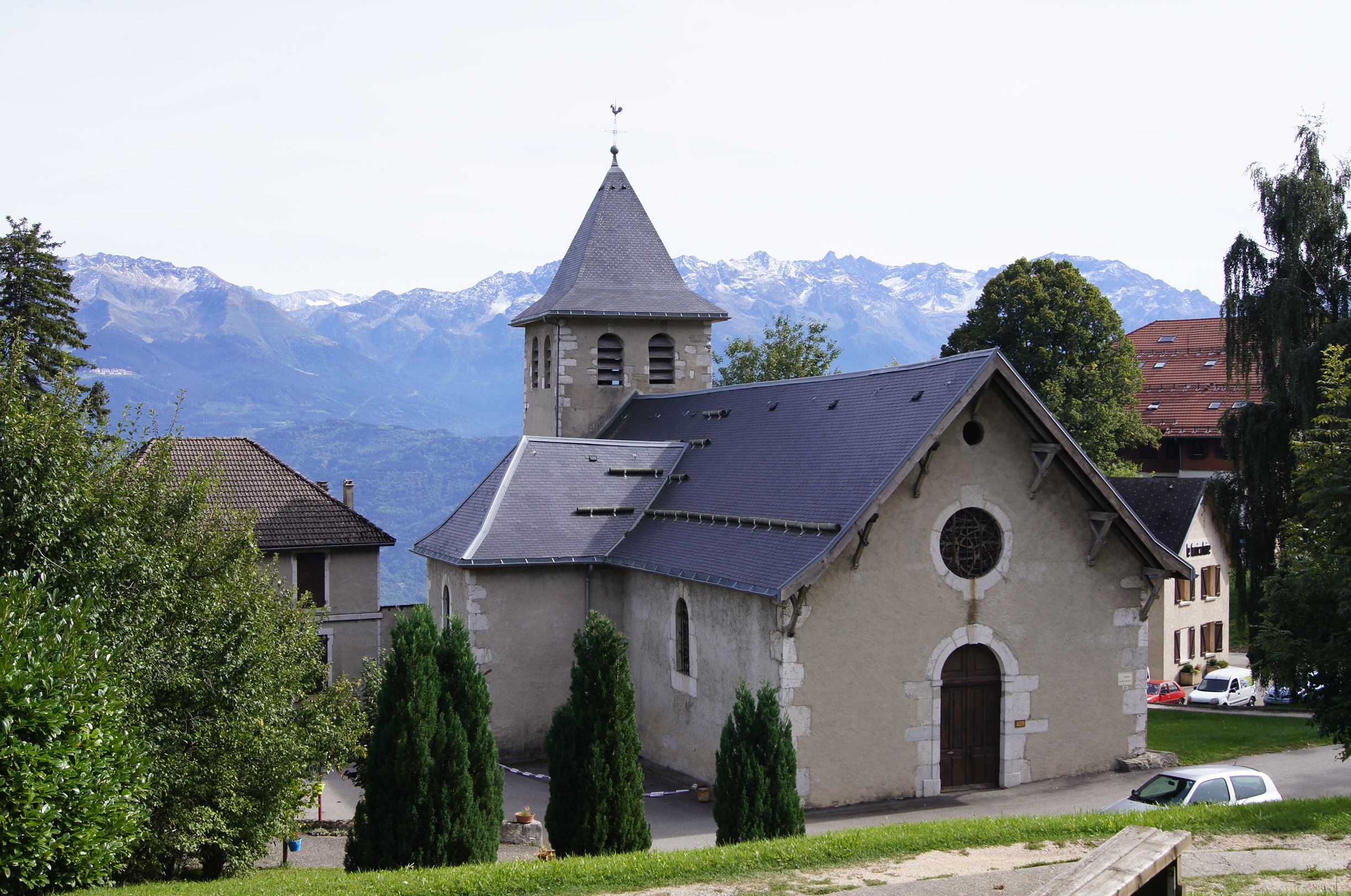 Eglise ST HILAIRE